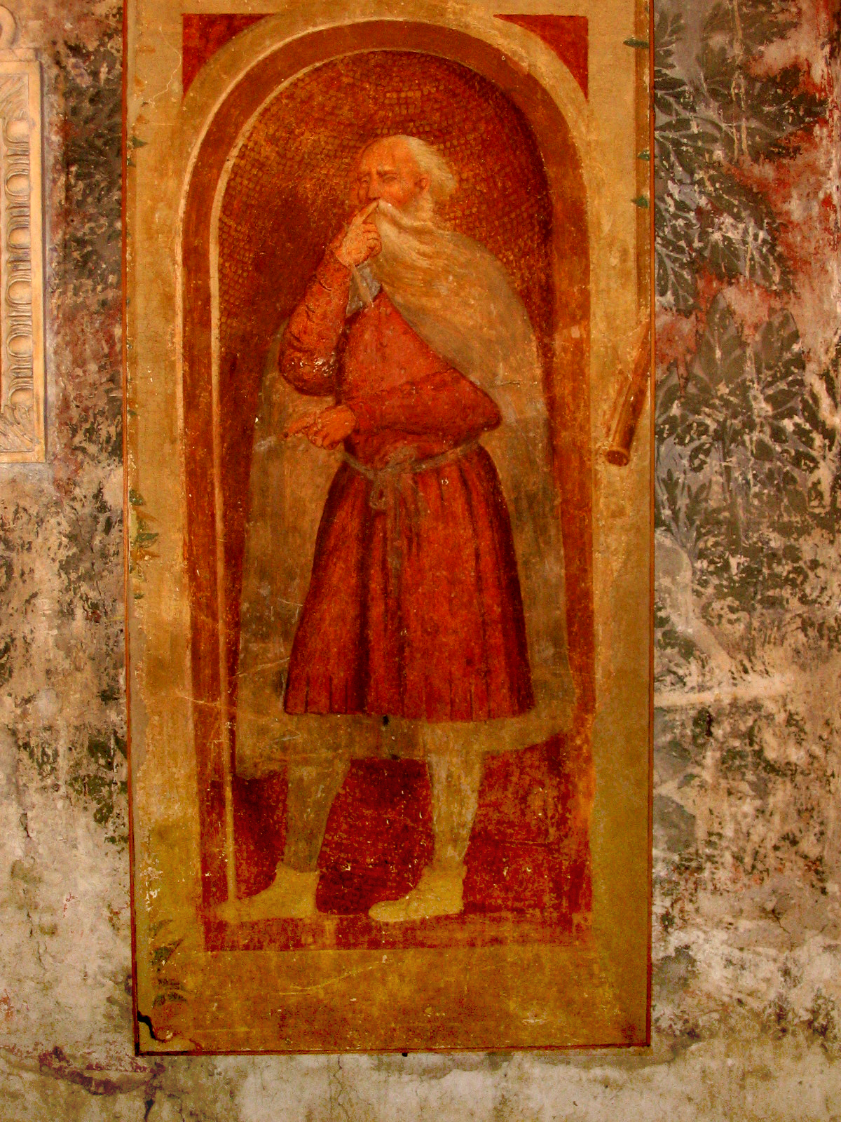 Affreschi del Castello di Malpaga, di Bartolomeo Colleoni - particolare: allegoria del Silenzio. Immagine ritoccata. Original. Remastered.